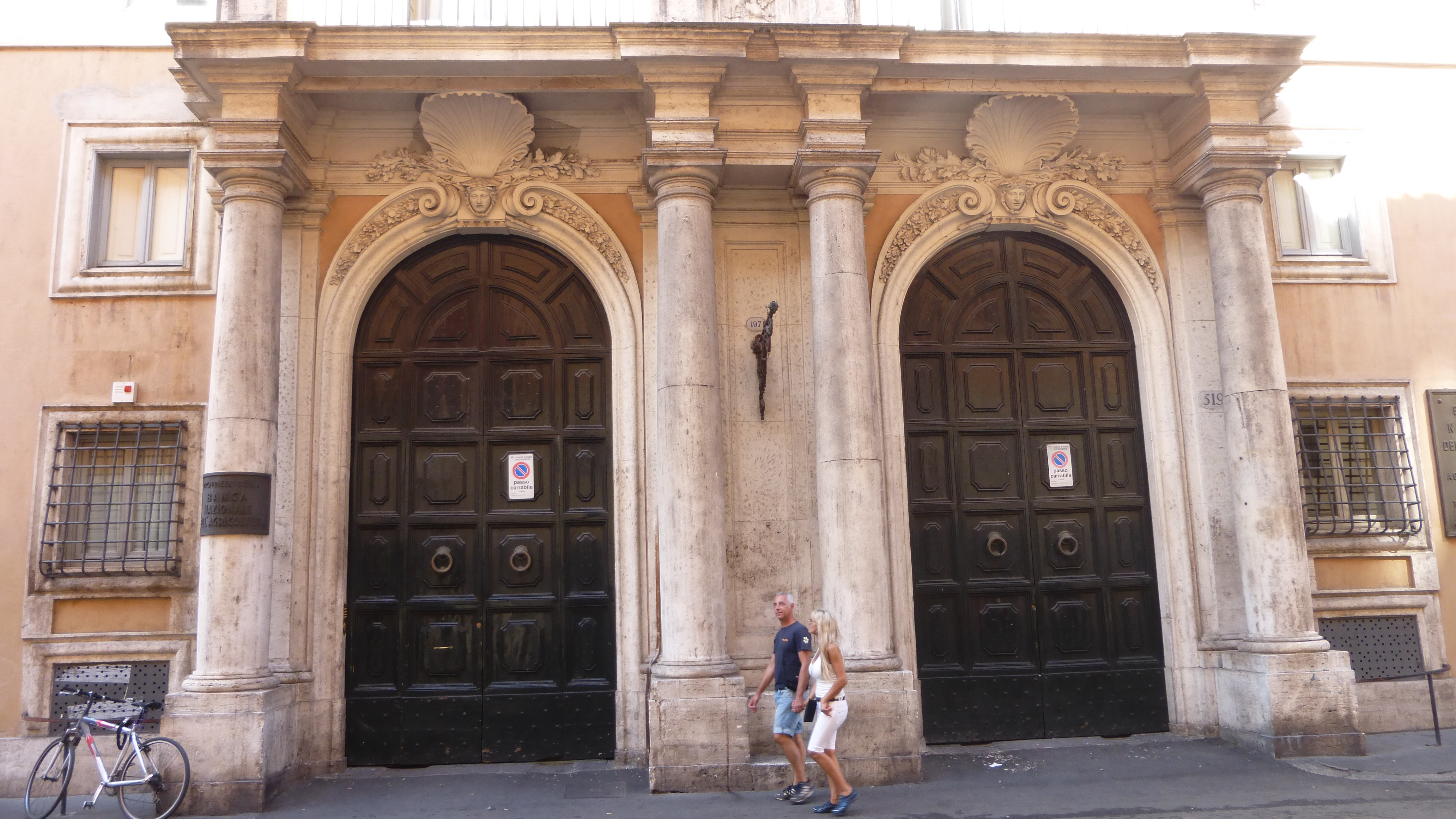 Roma, via del Corso. Palazzo Rondinini, portale.